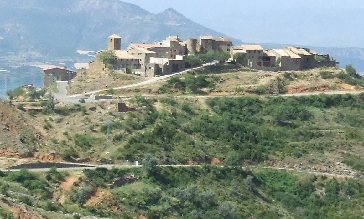 El poble de Claverol (Conca de Dalt, Pallars Jussà)